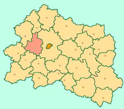 Orel Oblast map by Al Silonov Карта районов Орловской области